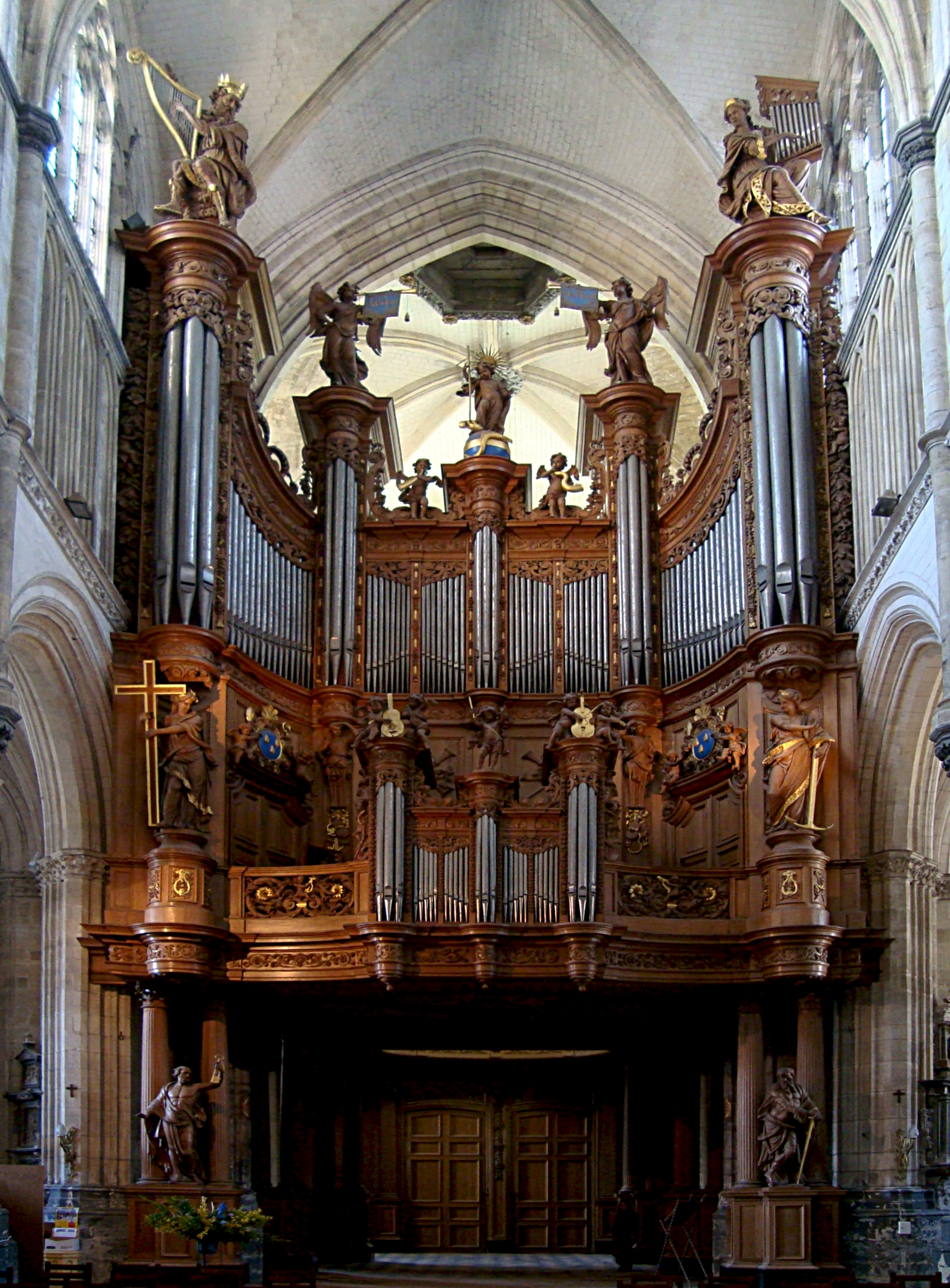 L'orgue de la cathédrale de Saint-Omer (Pas-de-Calais).